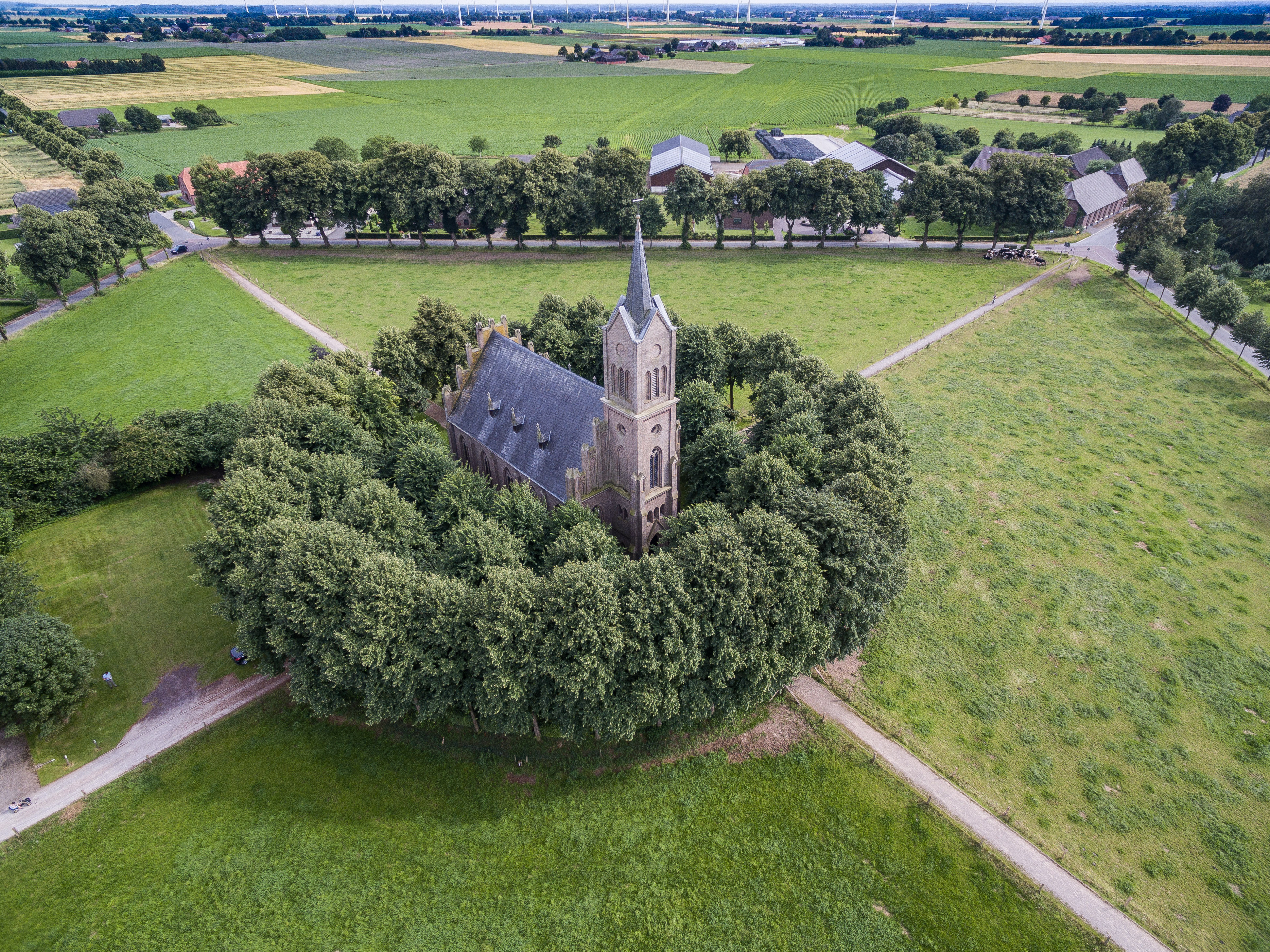 Panorama von der Elisabethkirche auf dem Louisenplatz, Bedburg-Hau; Platzbereich entspricht Landschaftsschutzgebiet „Louisenplatz“ (LSG 4203-0003)